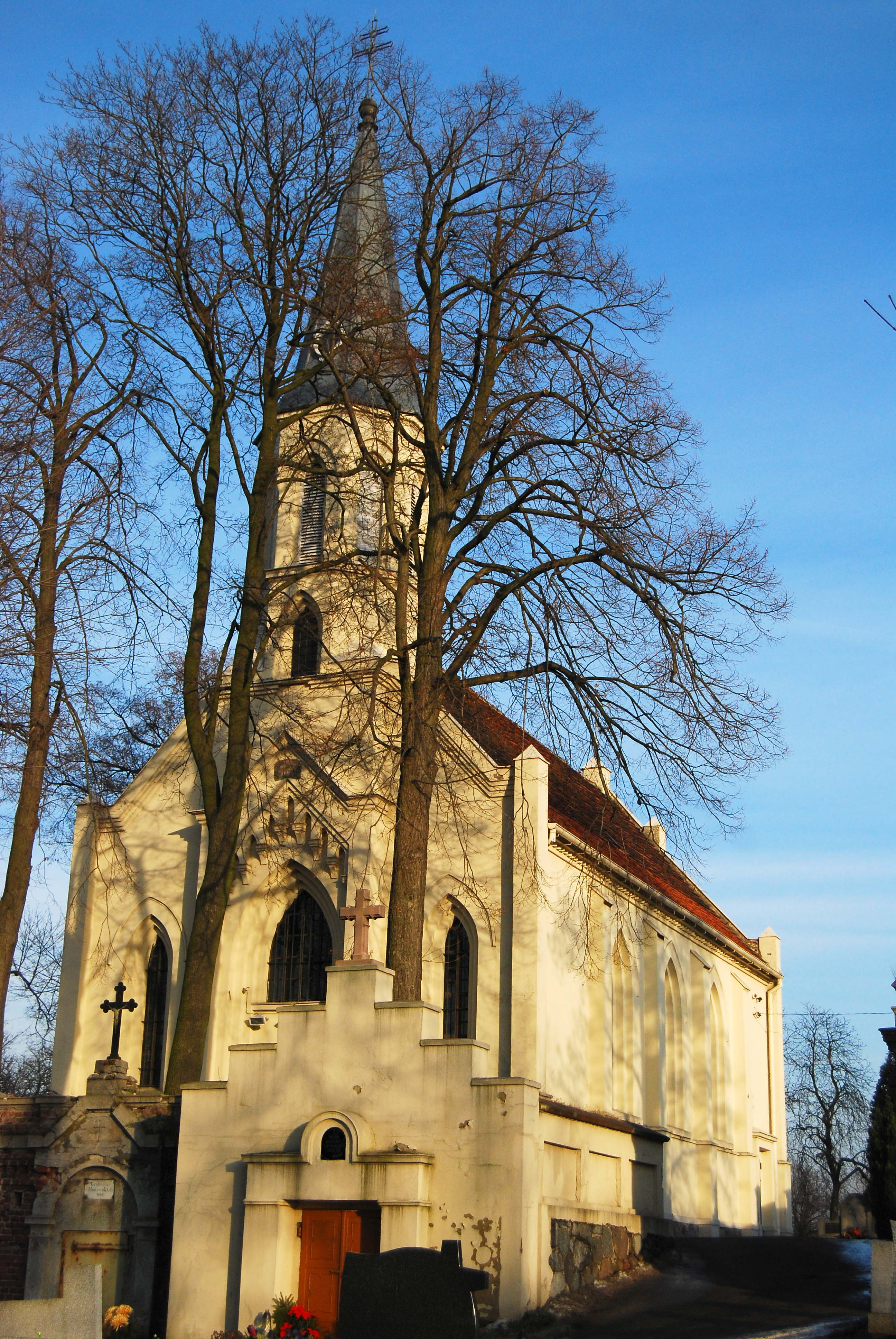 Gniezno, kanonia, XVIII